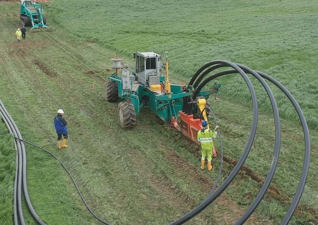 Ein Seilgezogener Verlegepflug verlegt Leerrohre für Höchstspannung und zusätzlich ein Leerrohr für Glasfaser.